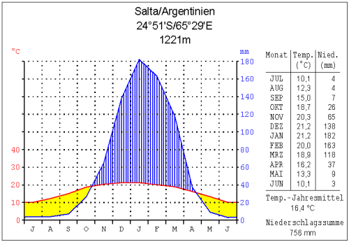 Klimadiagramm Salta (selbst erstellt; GNU-FDL)